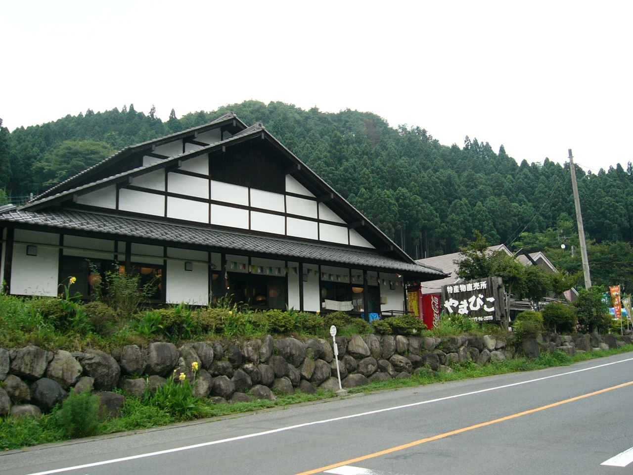 Michinoeki Kurohone.Yamabiko (Gunma)(道の駅くろほね・やまびこ)